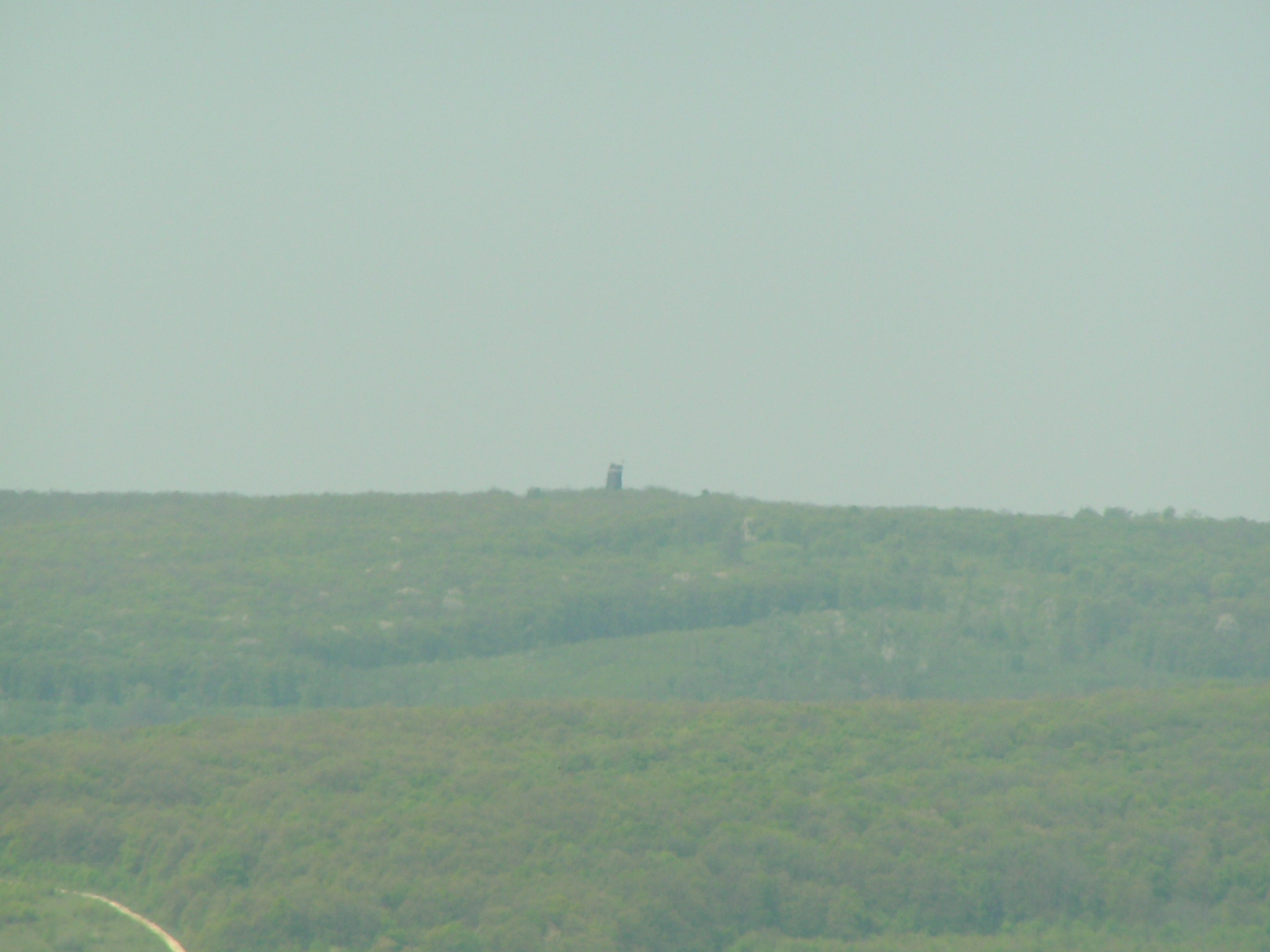 Csergezán